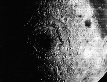 Mare Orientalis